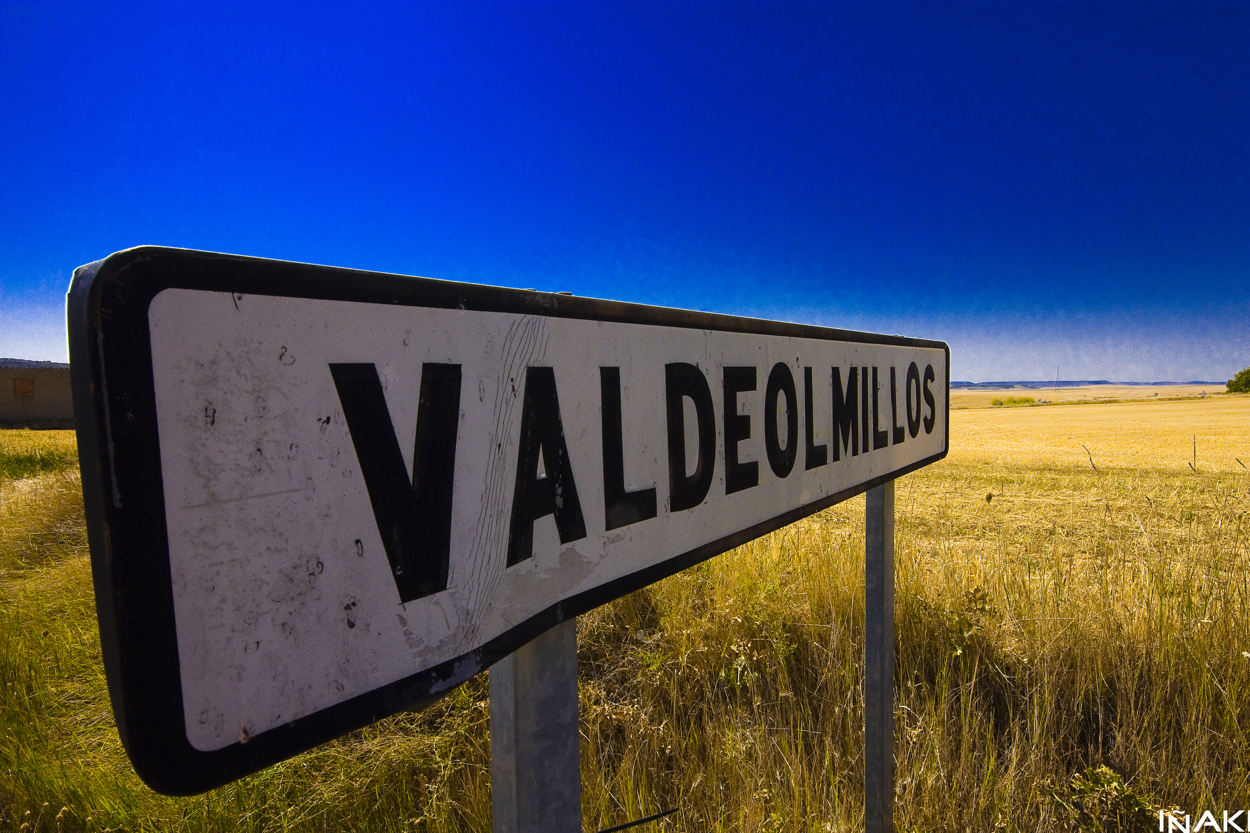 Indicador situado en el camino viniendo de Fuentes de Valdepero, frente a la antigua fabrica de yeso.